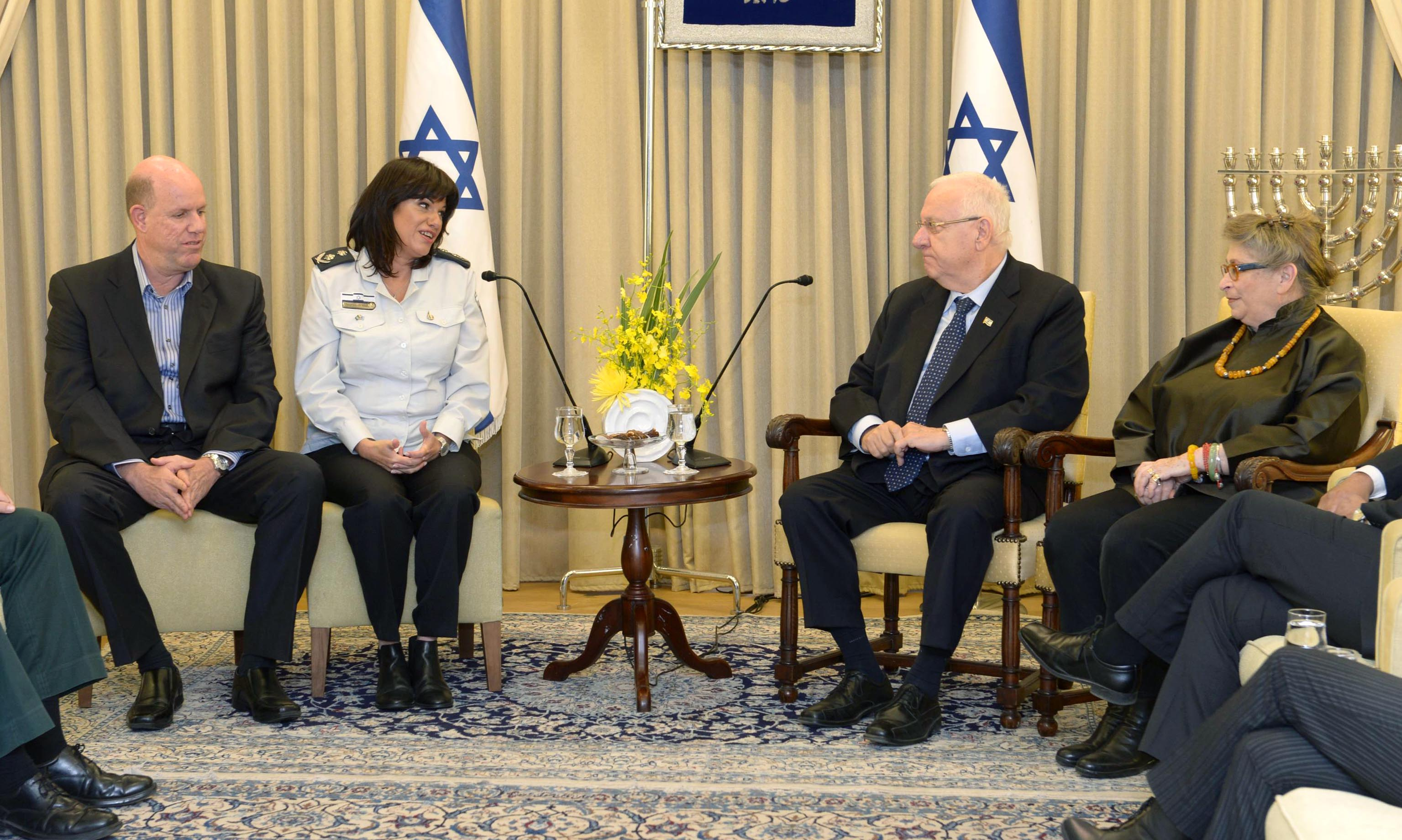 נשיא מדינת ישראל ראובן ריבלין מארח במשכנו את נציבת שירות בתי הסוהר רב גונדר עופרה קלינגר עם כניסתה לתפקיד.